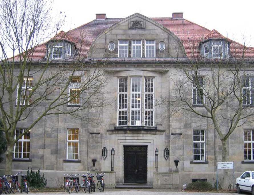 Kippenberg-Gymnasium Bremen, Vietor-Haus (ehemalige Biermann-Villa)